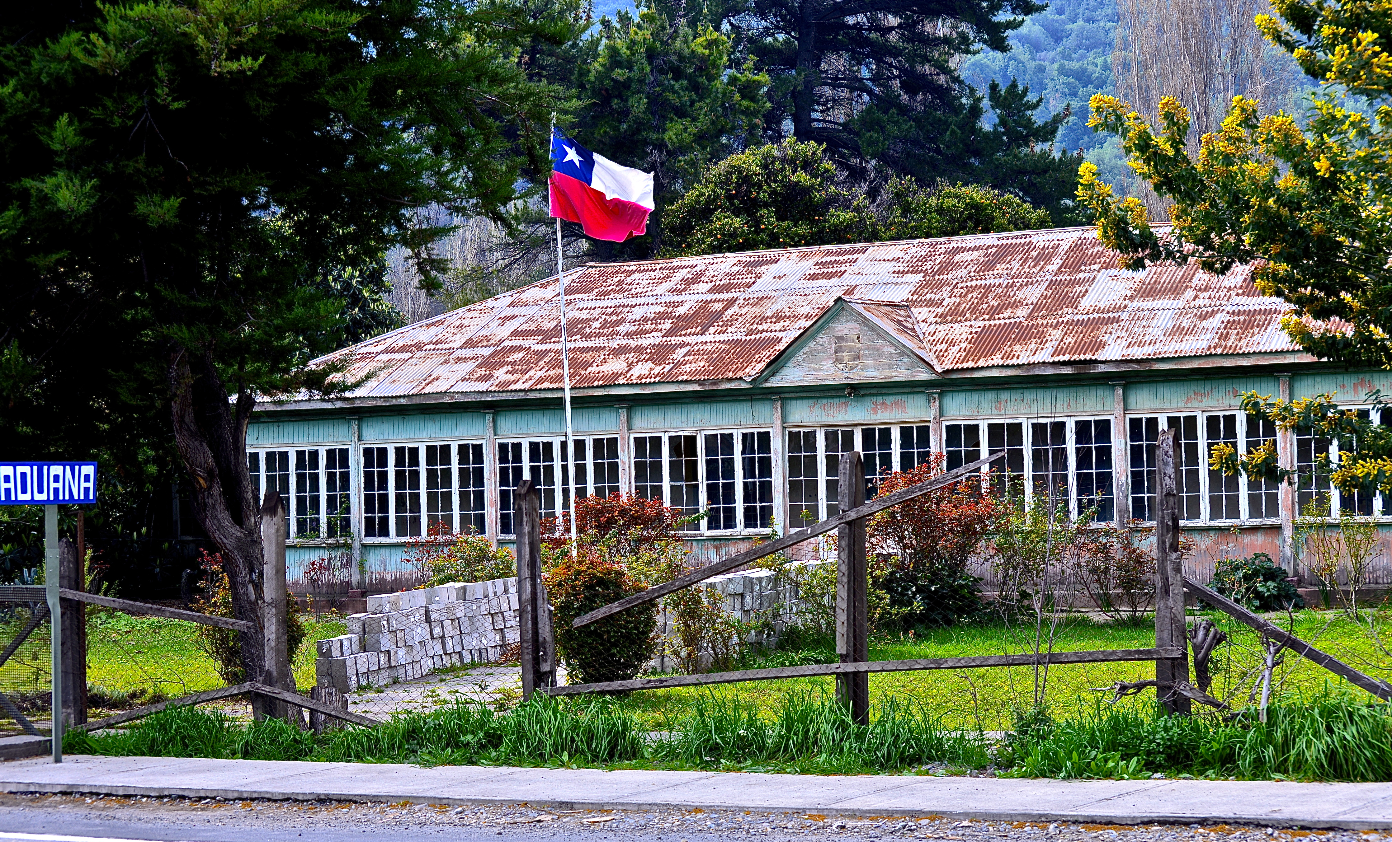 Aduana El Manzano This is a photo of a national monument in Chile: 1007